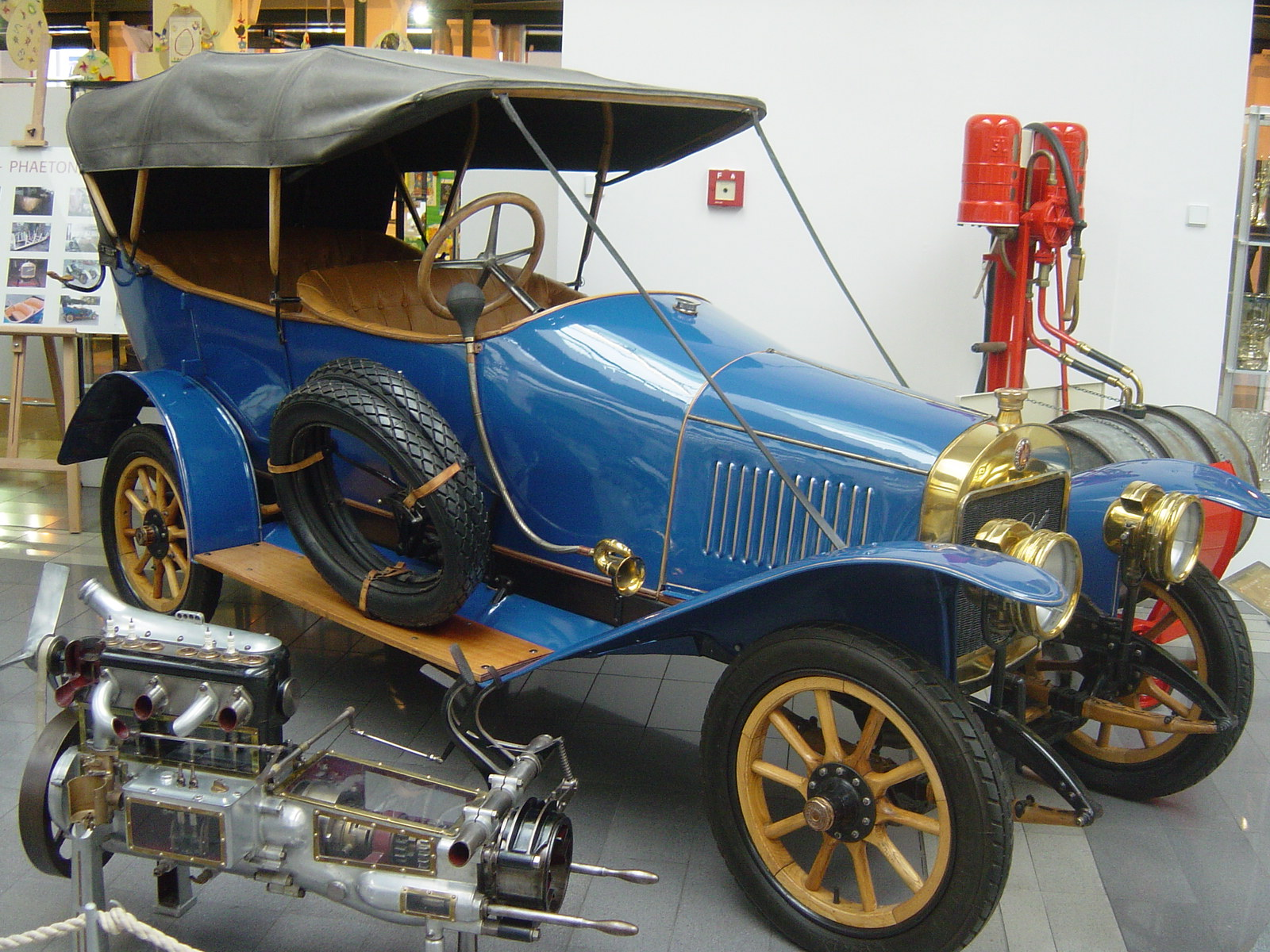 Laurin & Klement S, Skoda Museum